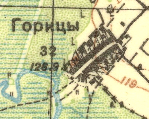 Топографическая карта Ленинградской области, квадрат О-35-23-В (Хотыницы), деревня Горицы